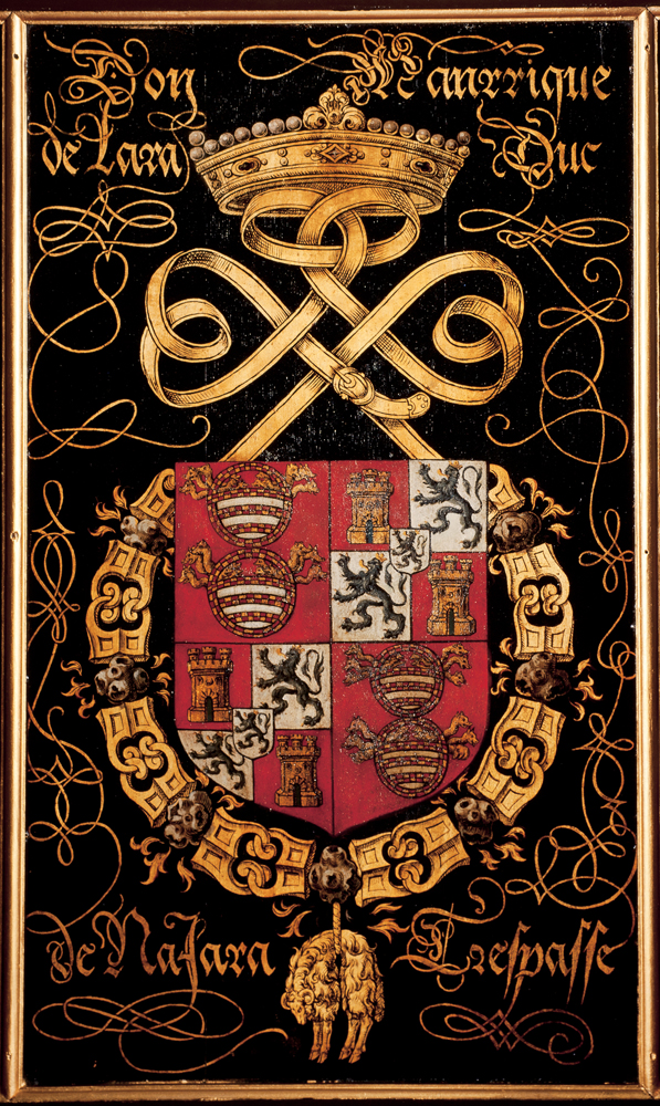 schilder uit Valenciennes; vermoedelijk Jacques Le Boucq, Blazoen van het 23ste Gulden-Vlieskapittel, 1559, Manrique de Lara Duc de Najara; inv: 433 N.199